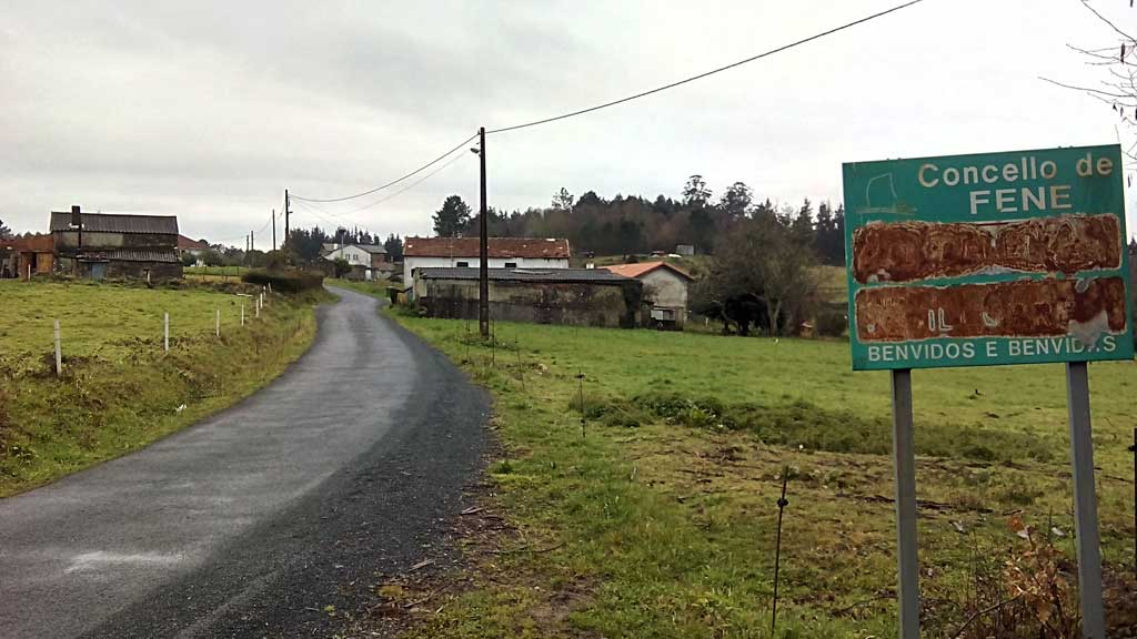 Vista de Belelle, Sillobre, Fene.